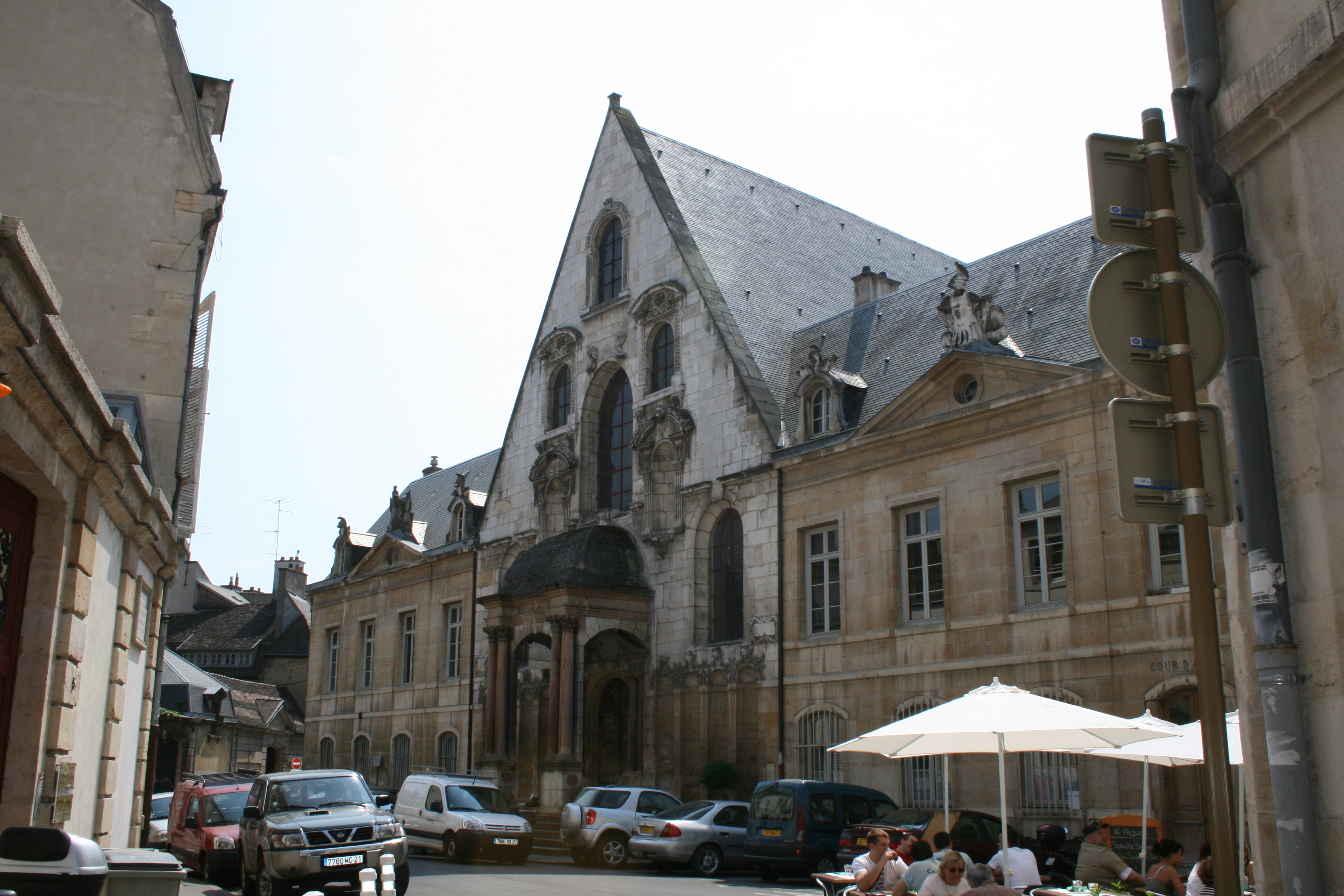 Façade Parlement Dijon